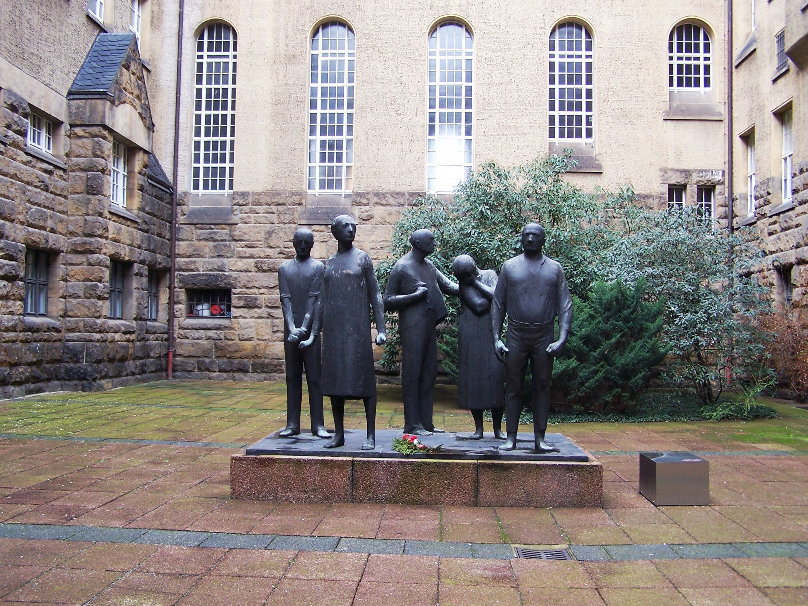 Gedenkstätte Münchner Platz Dresden, Figurengruppe von Arndt Wittig im Innenhof des heutigen Schumannbaus der TU Dresden